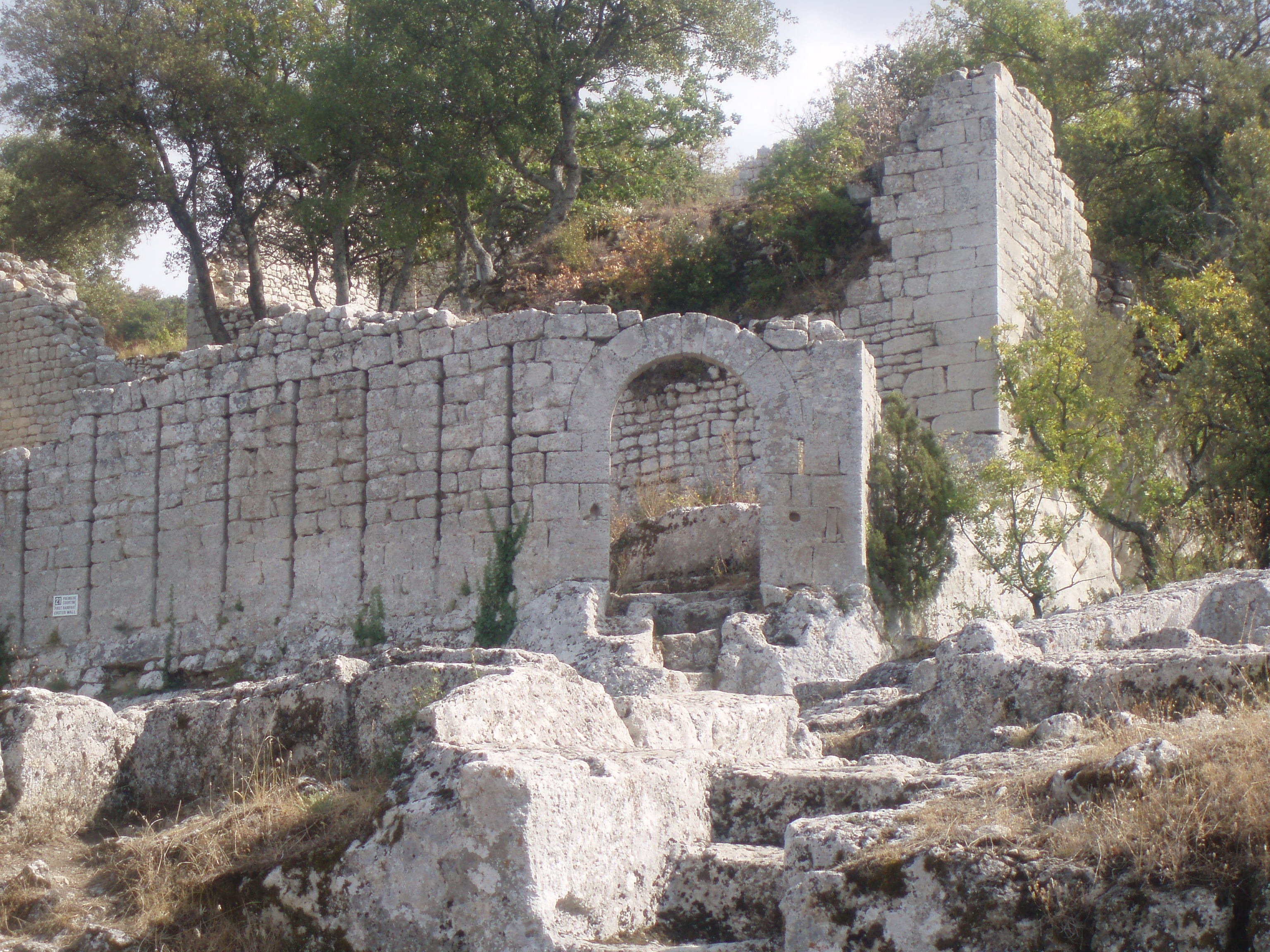 Ruines de la chapelle du fort médiéval de Buoux